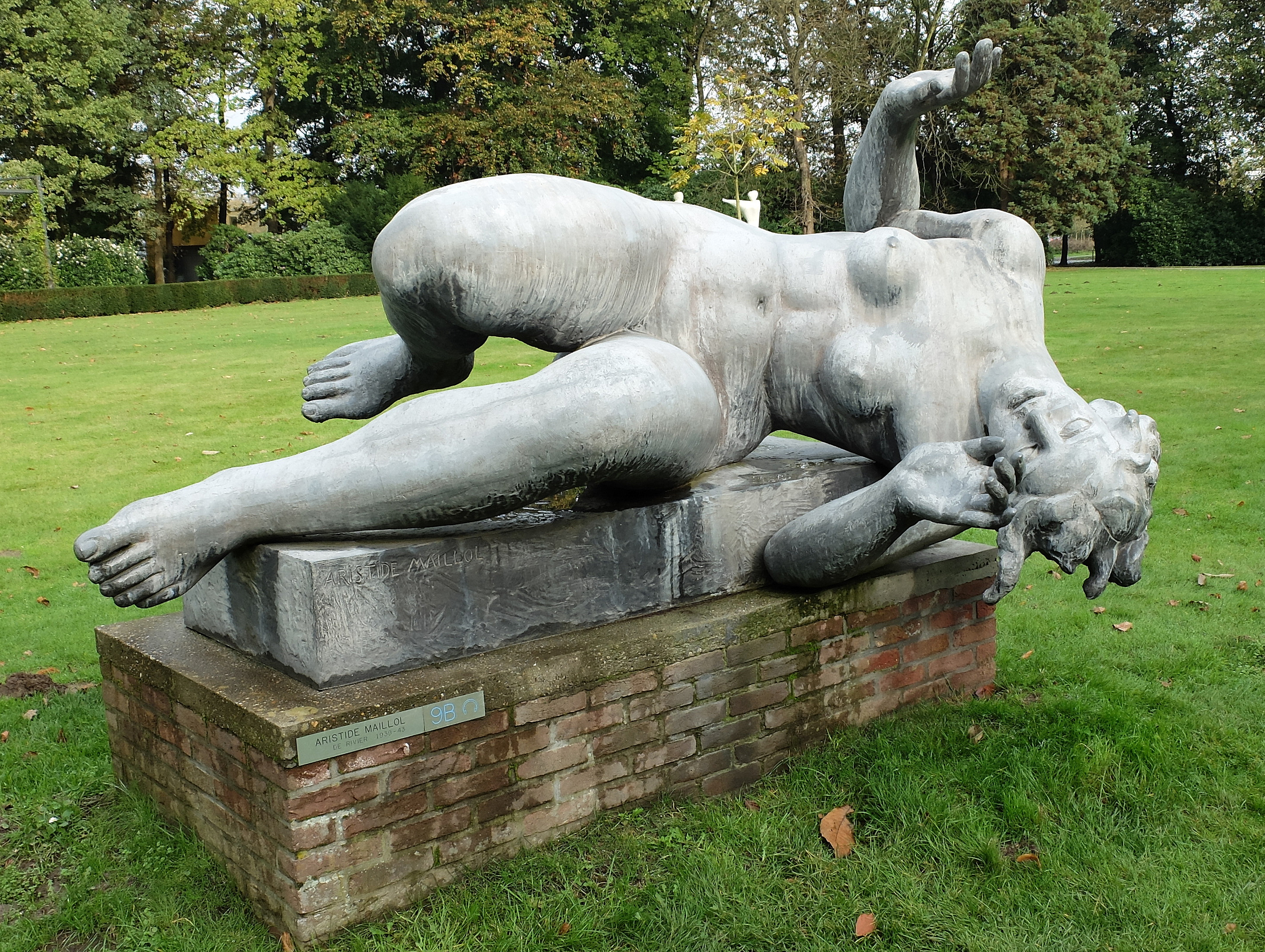 Aristide Maillol De rivier